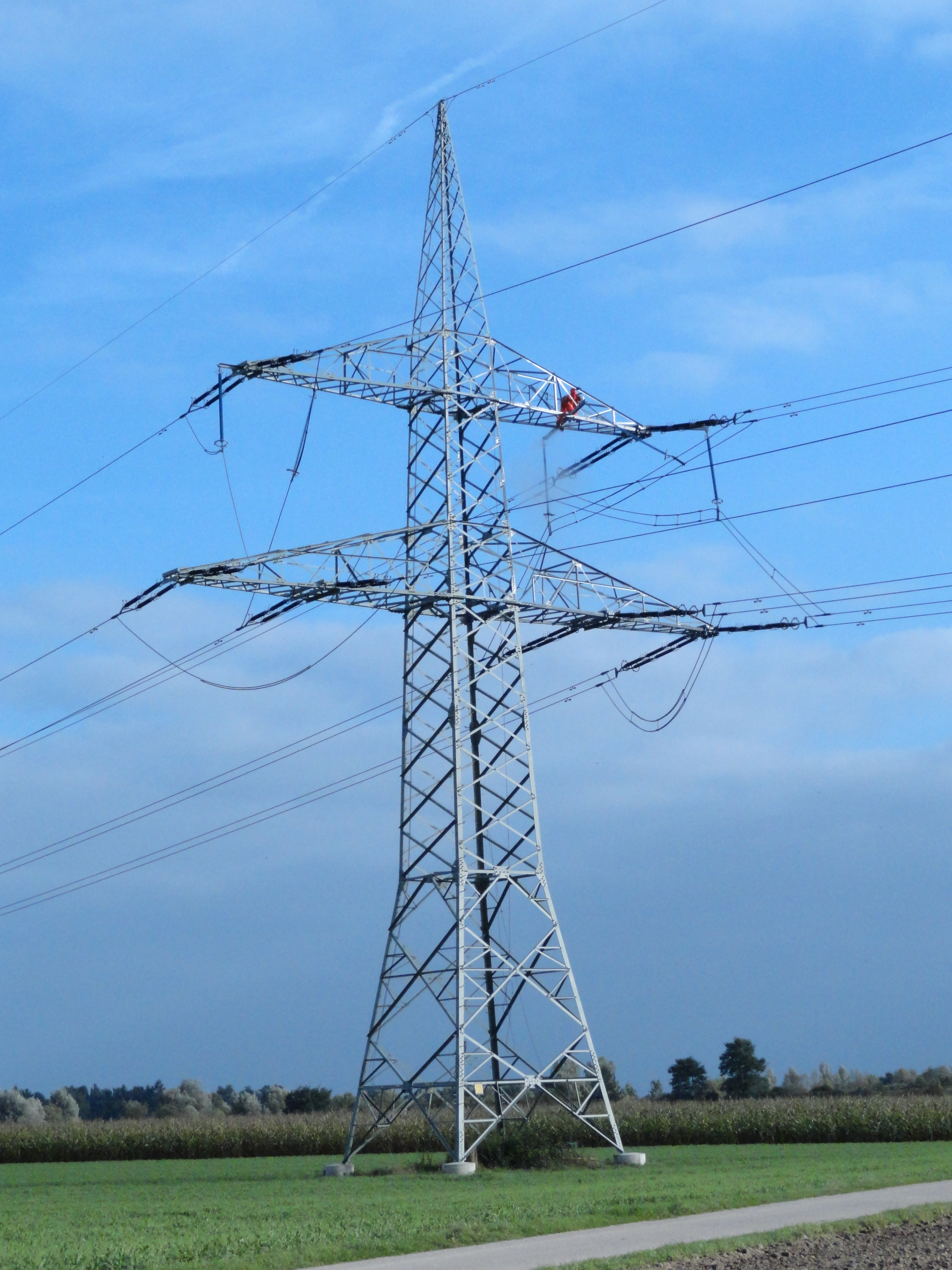 Abspannmast der Höchstspannungsleitung Schwandorf–Pleinting (380/220 kV) bei Kirchroth; Verdrillmast - die Zuordnung der Phasen zu den Leiterseilen wird hier verändert: an normalen Abspannmasten werden die Leiterschleifen unter den Isolatoren durchgeführt und so die elektrische Verbindung der Leiterseile rechts und links der Traverse hergestellt. Bei dem gezeigten Mast werden durch Leiterschleifen, die kreuzen oder von unten nach oben geführt werden, die Phasenzuordnung auf die Leiterseile verändert.